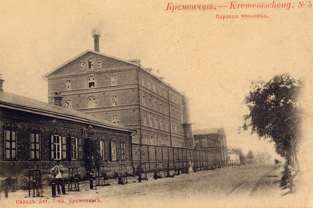 Postcards of old Kremenchuk. Паровий млин.